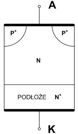 Struktura Diody MPS.